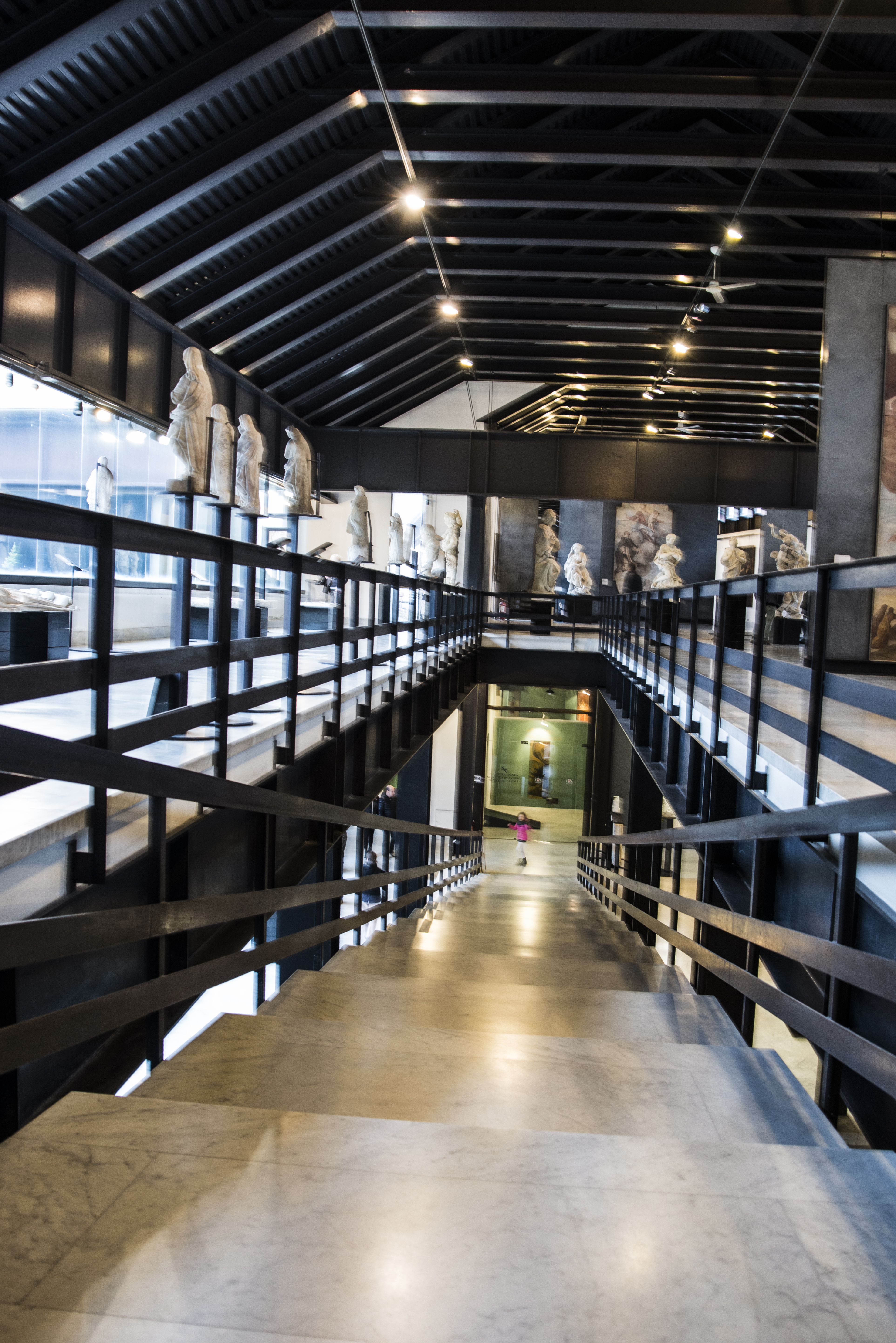 Chiostri e museo di Sant'Agostino, vista della moderna area espositiva fuori dalla chiesa sconsacrata This is a photo of a monument which is part of cultural heritage of Italy.